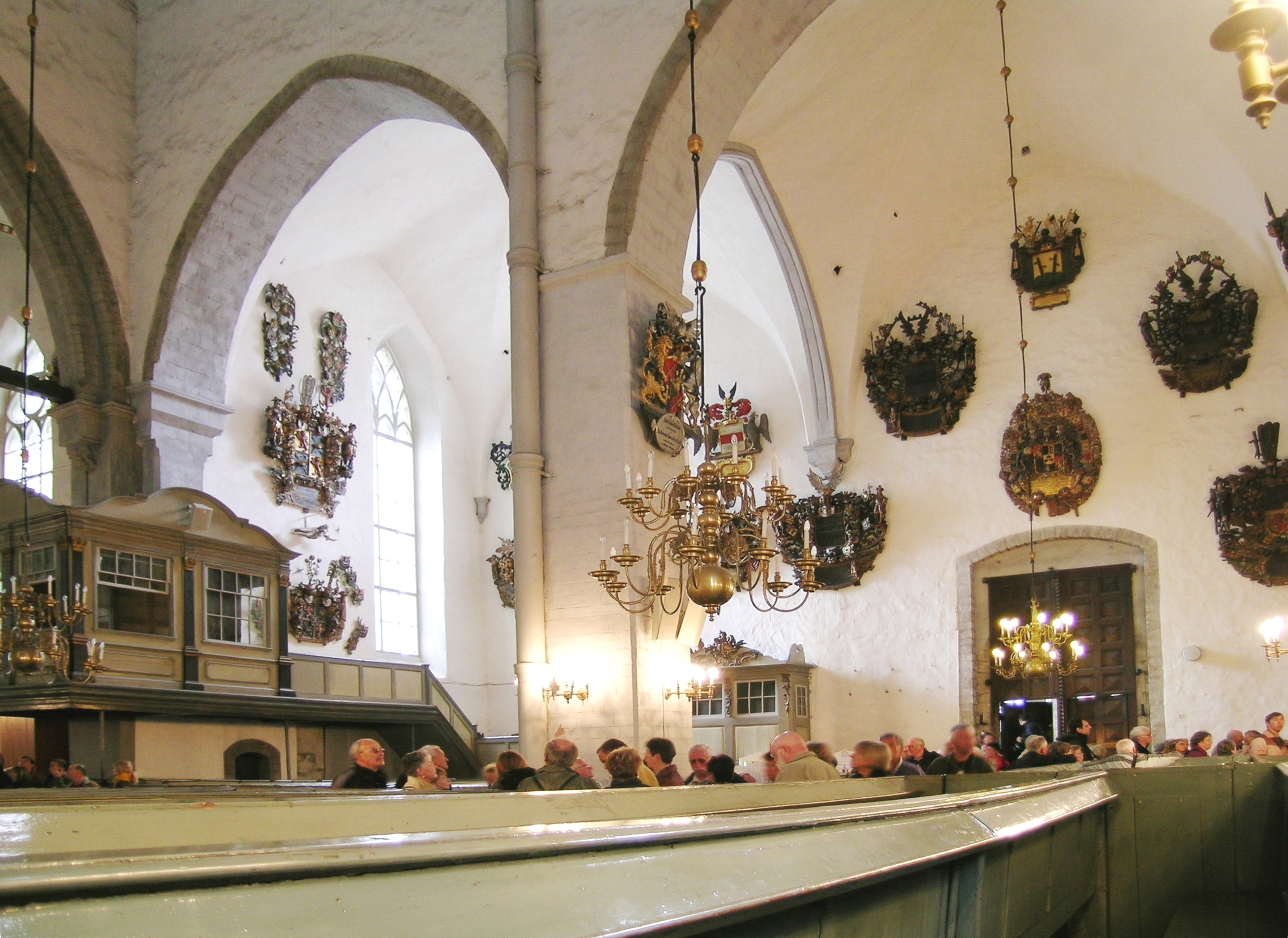 Domkirche Tallinn mit Wappenepitaphen estländischer Adliger